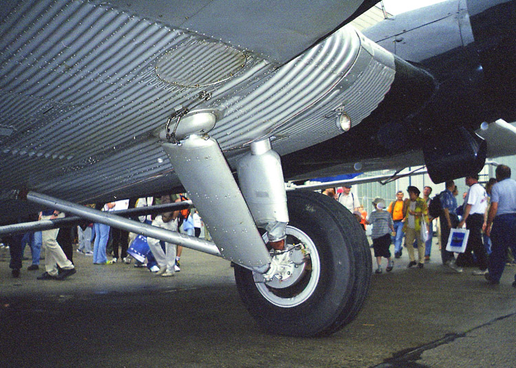 Ju-52 landing gear Podwozie główne samolotu Ju-52